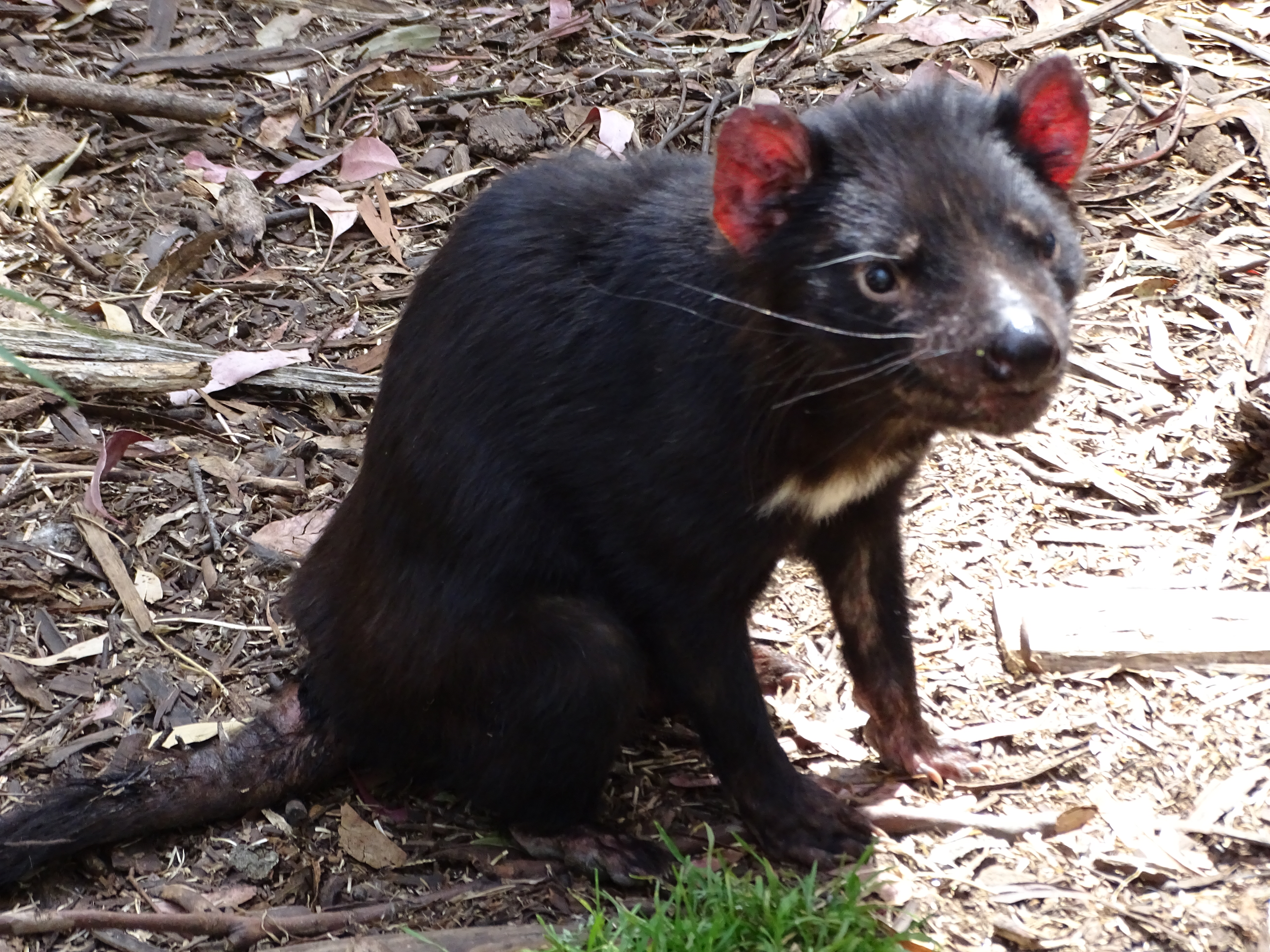 Beutelteufel (Tasmanian devil), Sarcophilus harrisii, Trowunna Wildlife Park, Tasmanien; fotografiert in Trowunna Wildlife Park